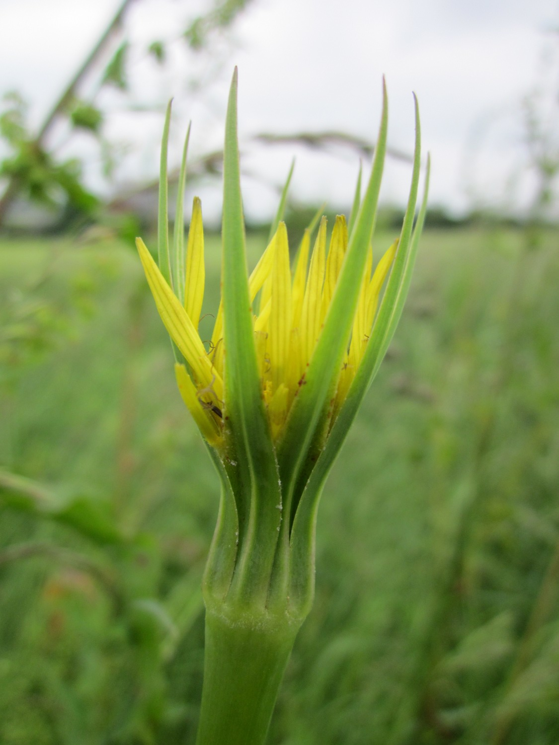 Großer Bocksbart (Tragopogon dubius) im Hockenheimer Rheinbogen